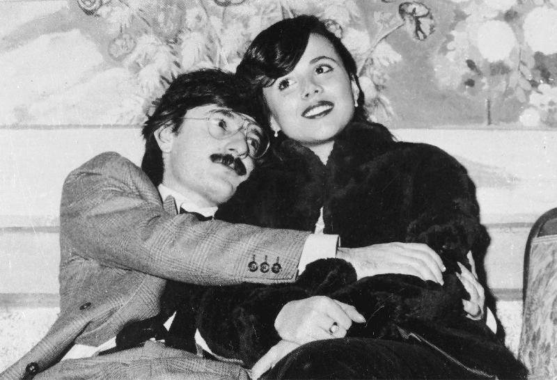 Stefano Baldi e Susanna Cambi - le vittime del quarto delitto del cosiddetto Mostro di Firenze, uccisi il 23 ottobre 1981 a Calenzano.